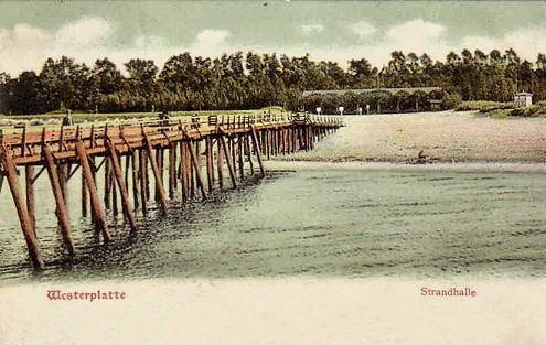 Plaża i nieistniejące molo w kurorcie Gdańsk Westerplatte.